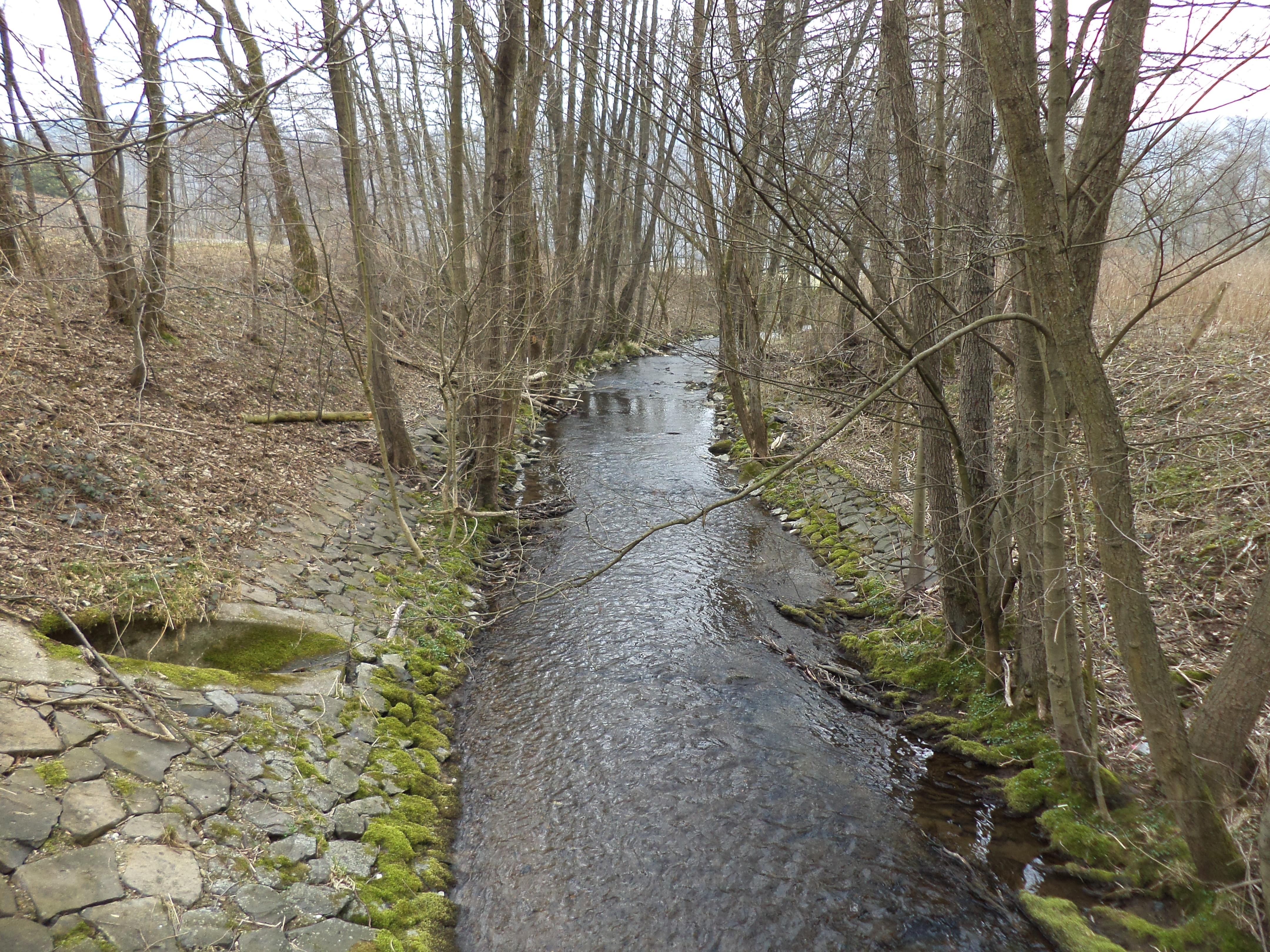 Der Ulmbach unterhalb der A66